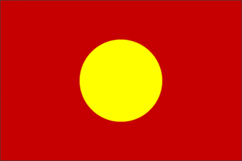 cờ vua Quang Trung